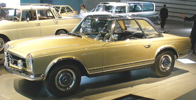 Mercedes-Benz Museum Stuttgart W113 230SL Roadster von 1963